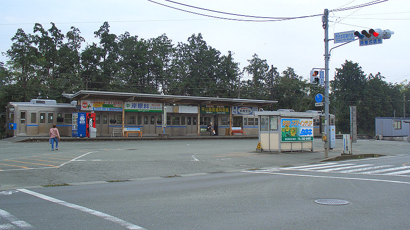 熊本電気鉄道御代志駅 右が北熊本駅方面。 撮影者/著者/著作権保有者 : MK Products (本人がアップロード) 撮影日 : 2006/09/24 御代志駅用にアップロードした画像です。良い画像があれば別の画像に変えてください。